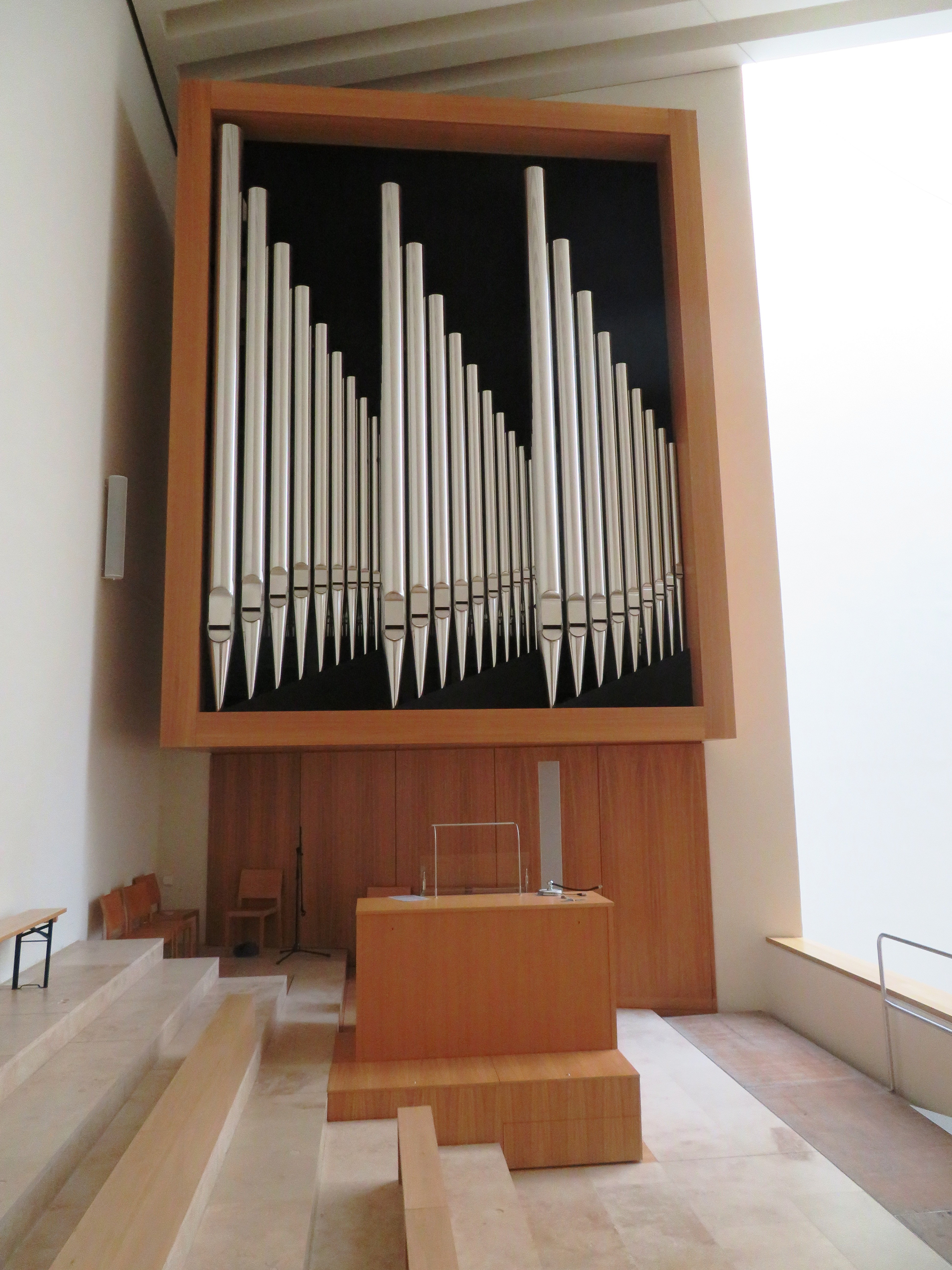 Propsteikirche St. Trinitatis (Neue Propsteikirche) Leipzig, Vleugels-Orgel (op. 430)